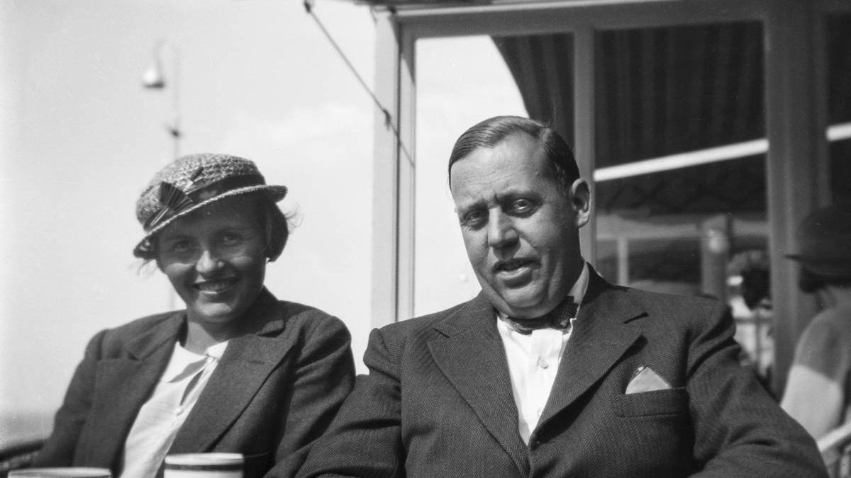 Annemie en Helmuth Wolff, Amsterdam, jaren dertig